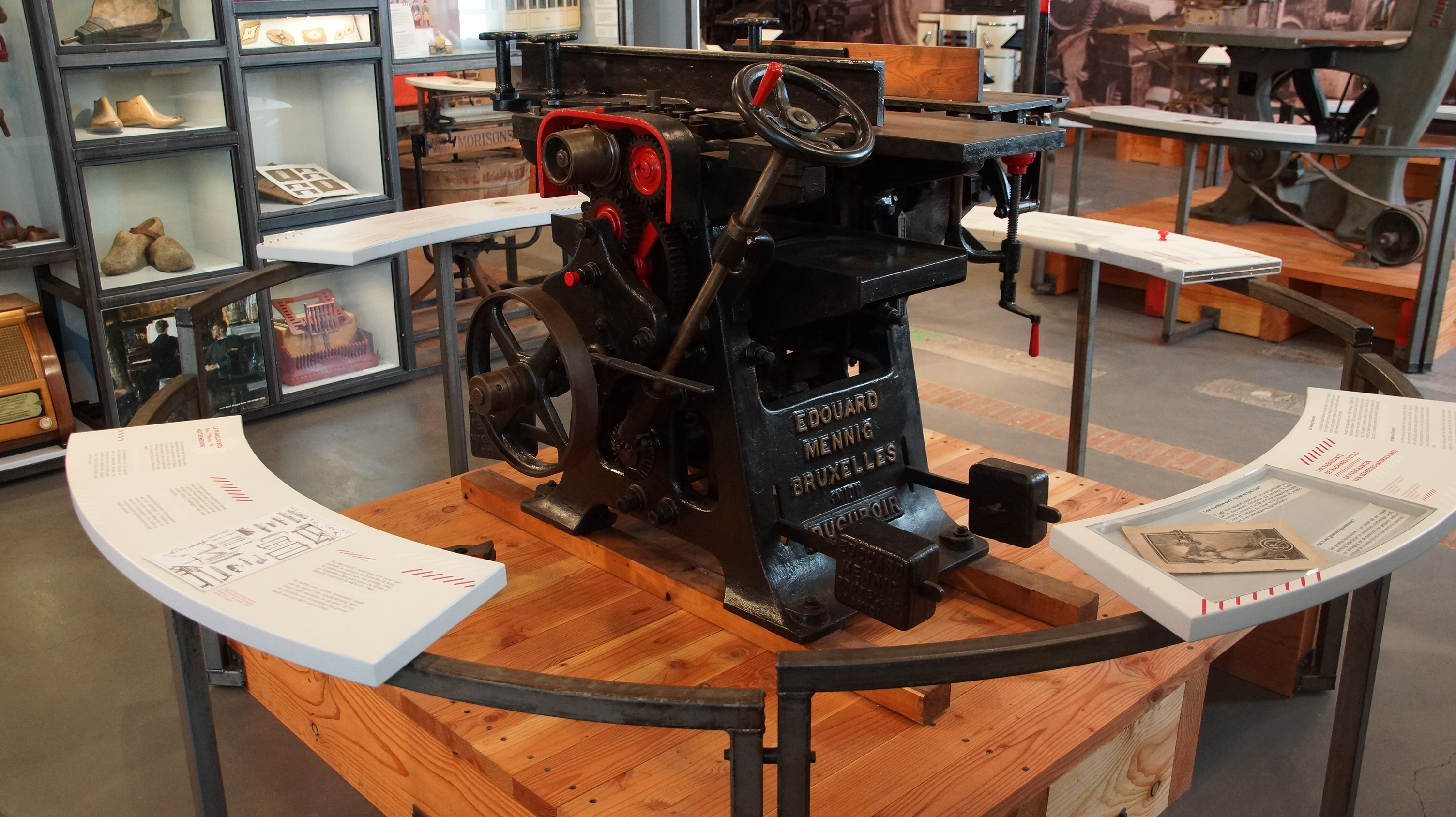 Woodworking machine by Edouard Mennig - Brussels Midi - Ducouroir exhibited at La Fonderie, Brussels Museum of Industry and Labour